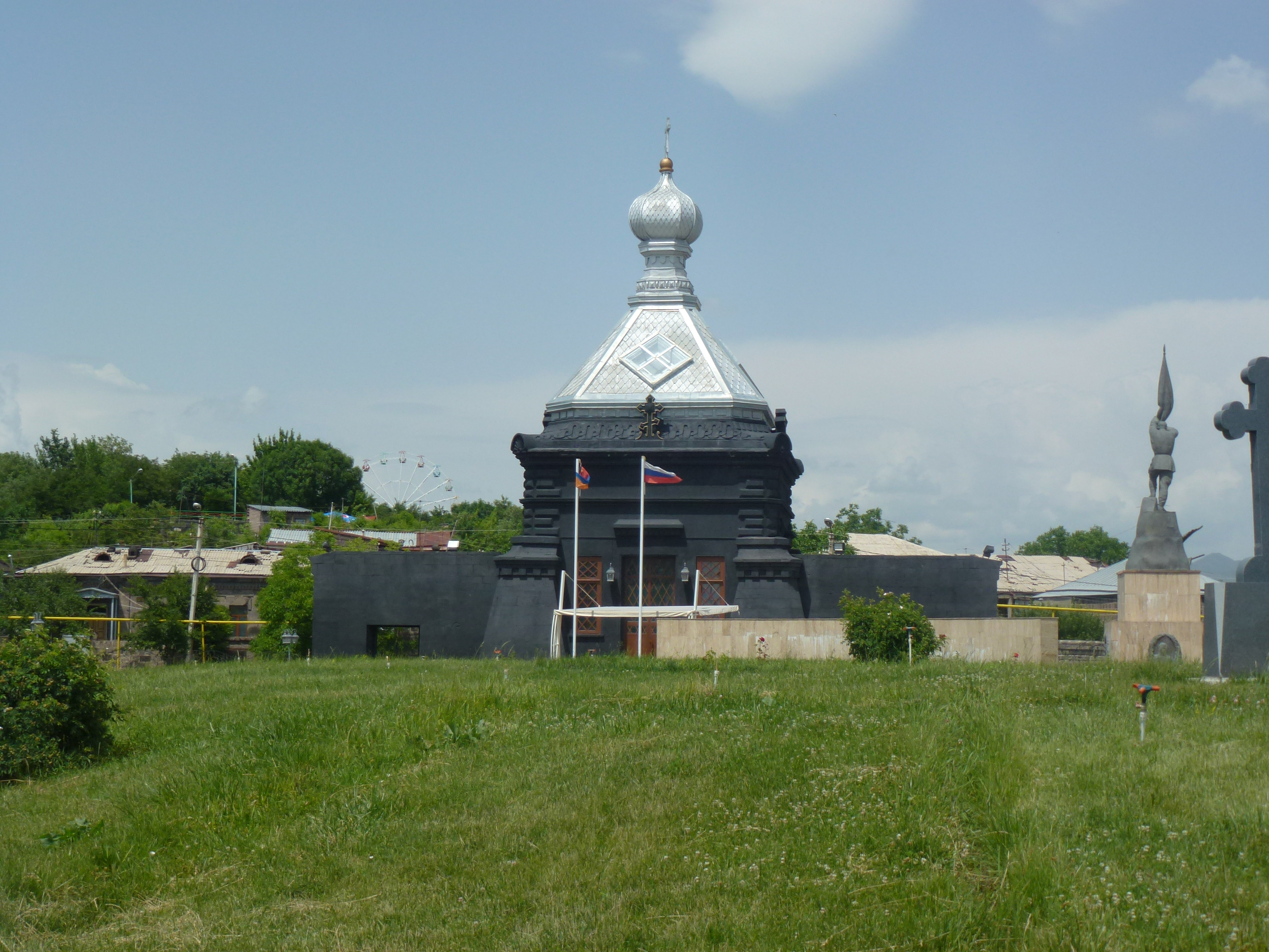 Սուրբ Միքայել հրեշտակապետի եկեղեցի («Պլպլան ժամ», Գյումրի) 1/4.892